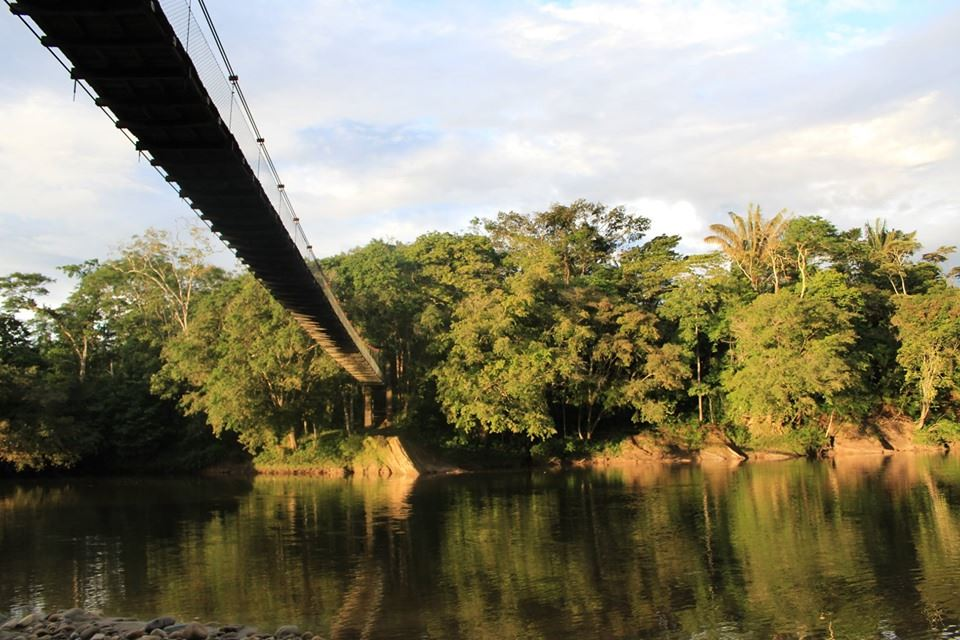 Estadero Naranjito en Orito Putumayo